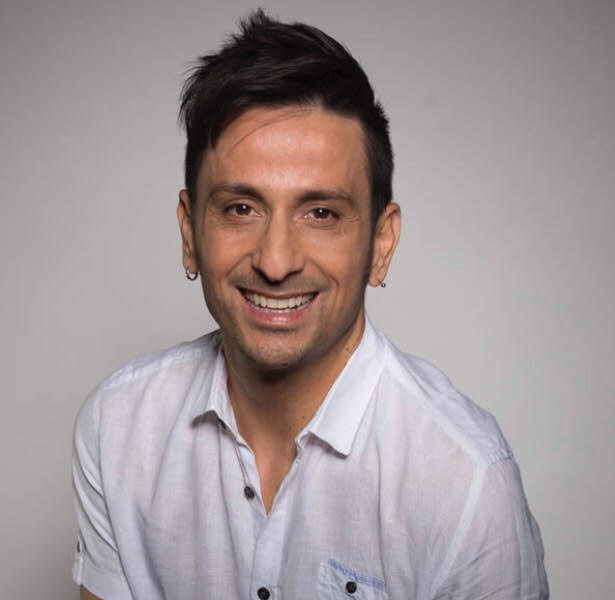 Max Del Buono